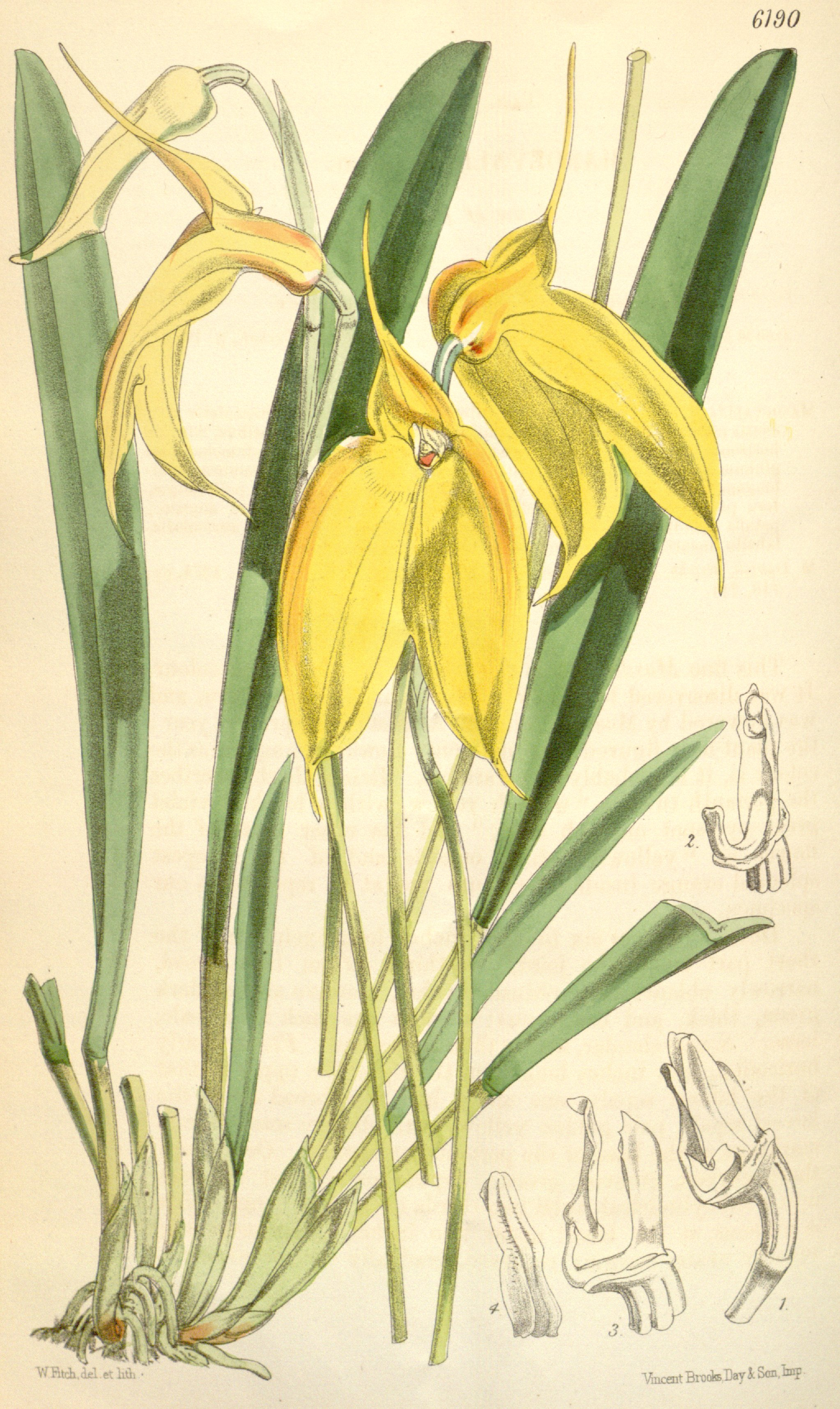 Illustration of Masdevallia davisii